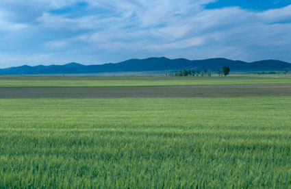 Fotografía Comarca del Jiloca. Montes de la Cuenca de Gallocanta.